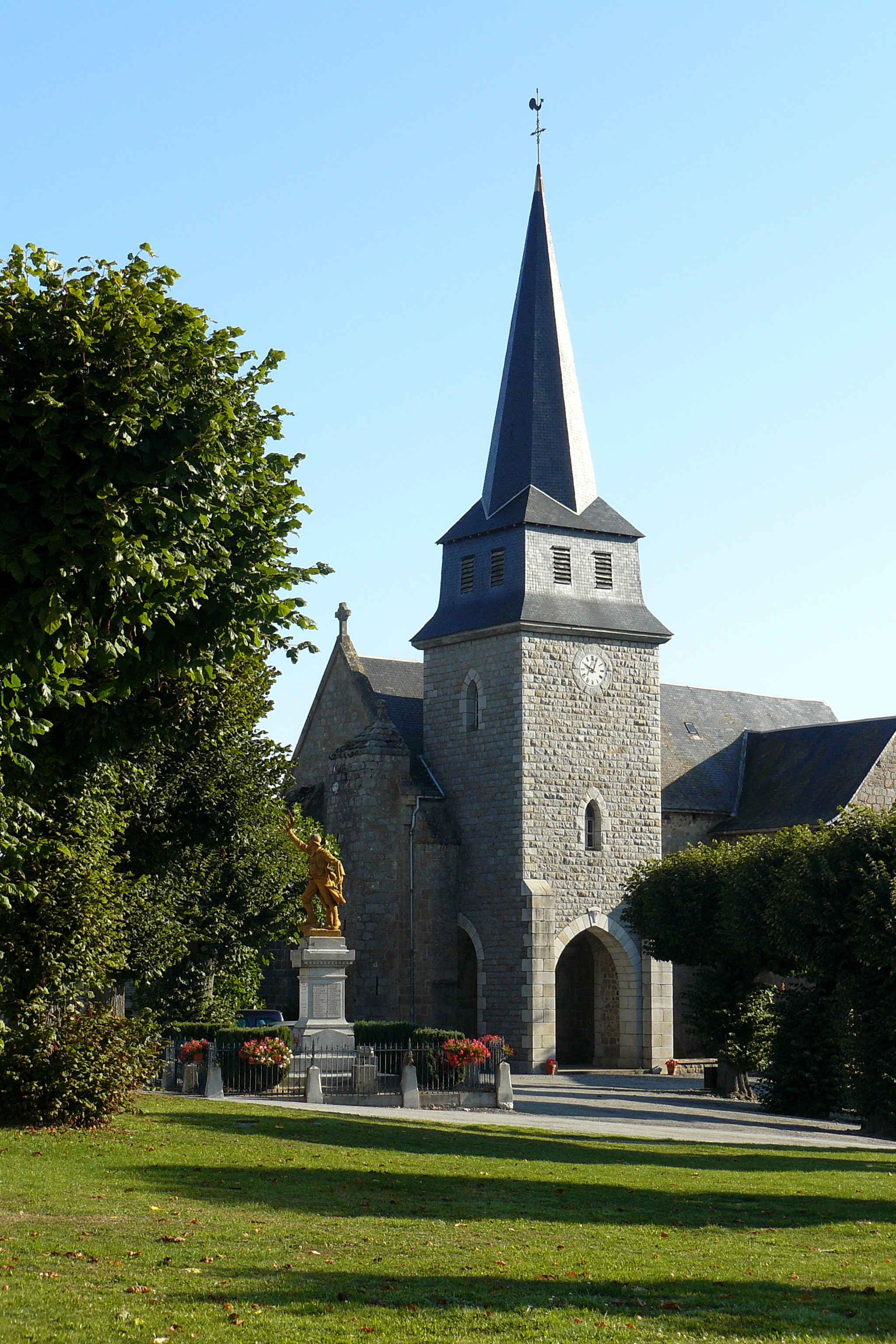 Église Saint-Laurent à Rougnat (Creuse, France)